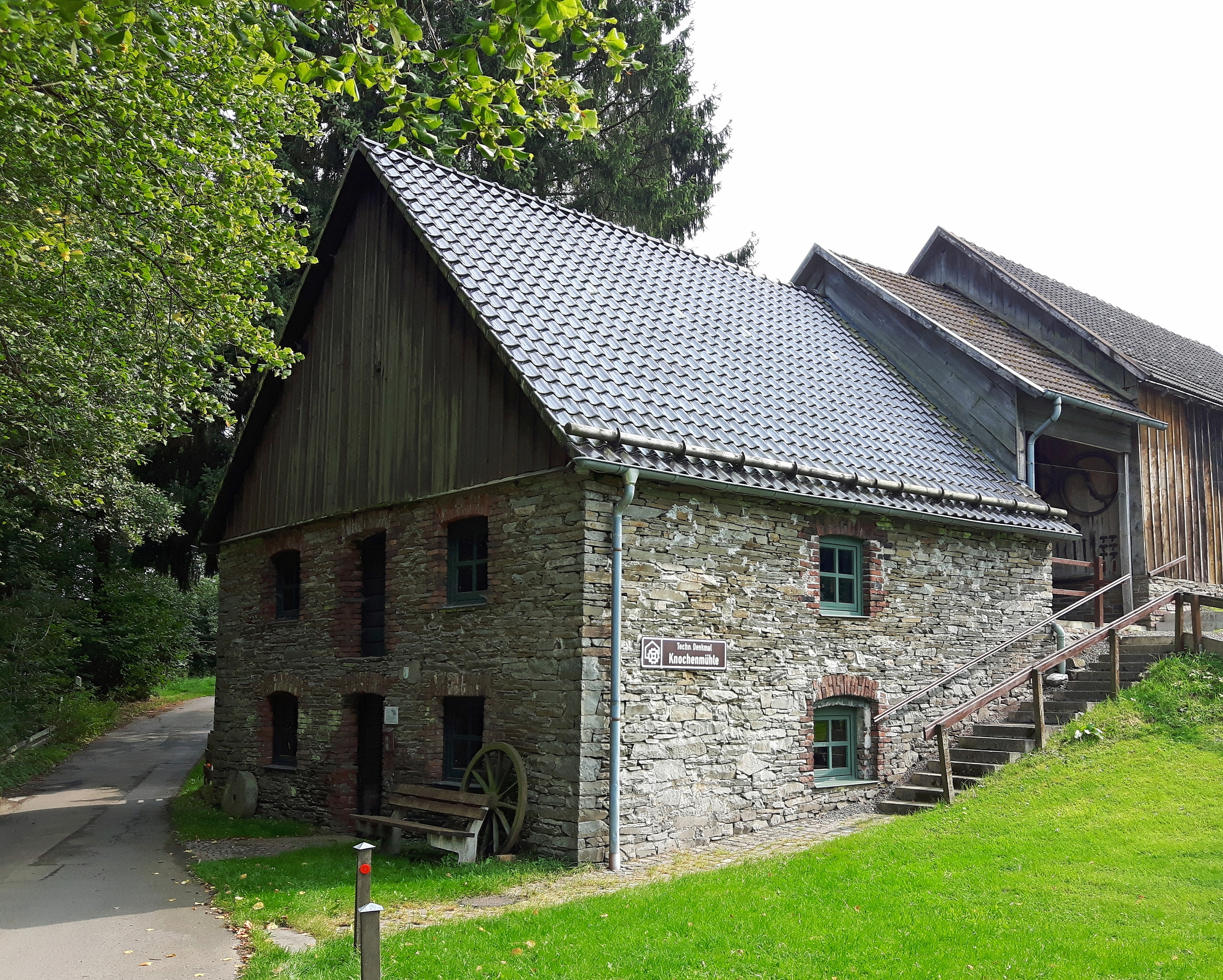 Meinerzhagen, denkmalgeschützte Knochenmühle